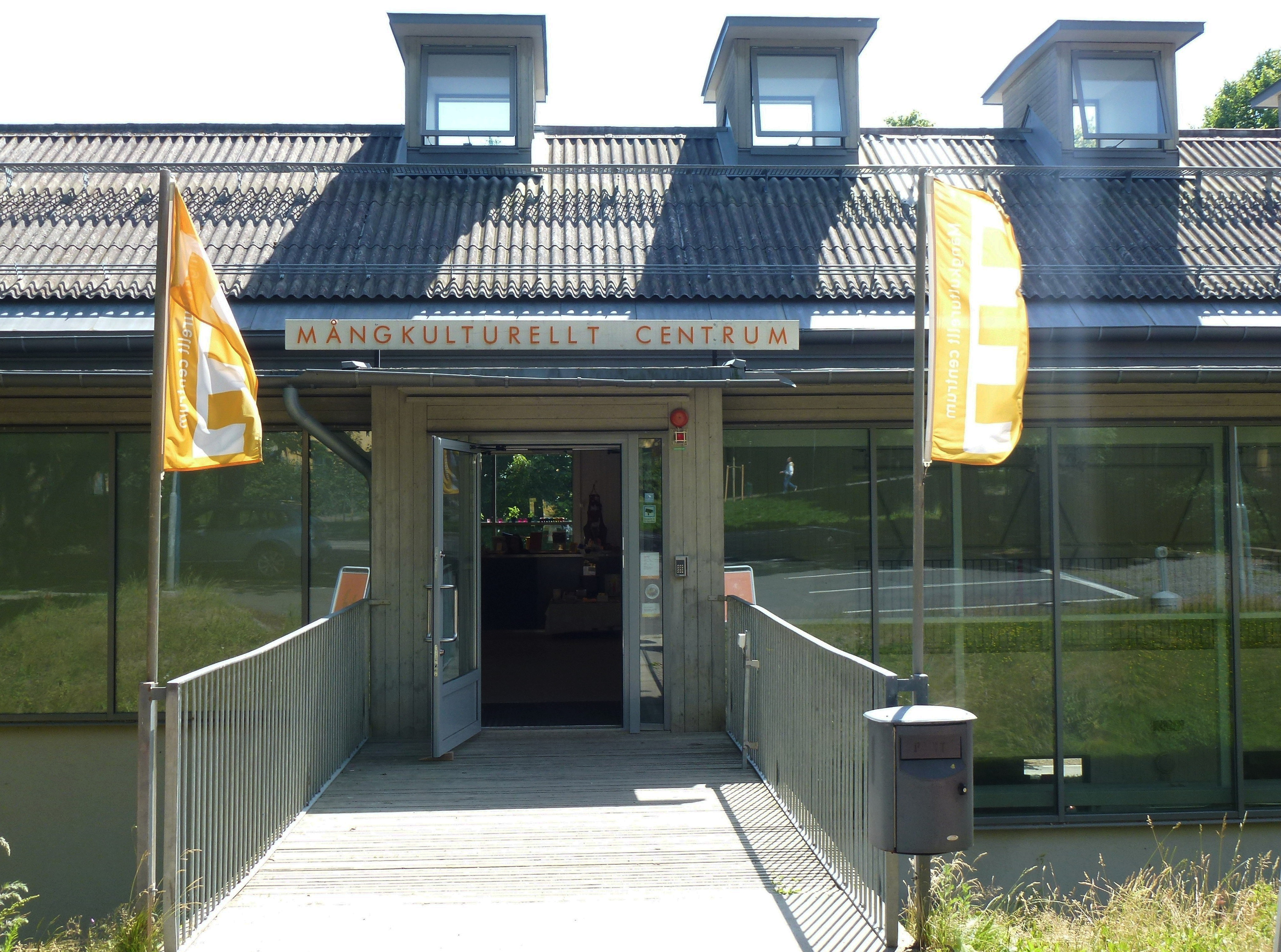 Mångkulturellt Centrum Fittja